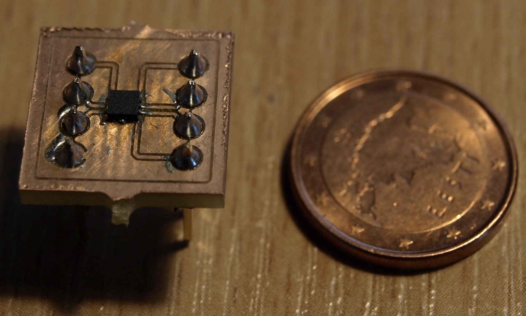 Kujutatud on H-bridge DRV8837 integraalskeemi jalgade väljaveo plaat. Seda kasutatakse parema ligipääsu saamiseks testimise eesmärgil